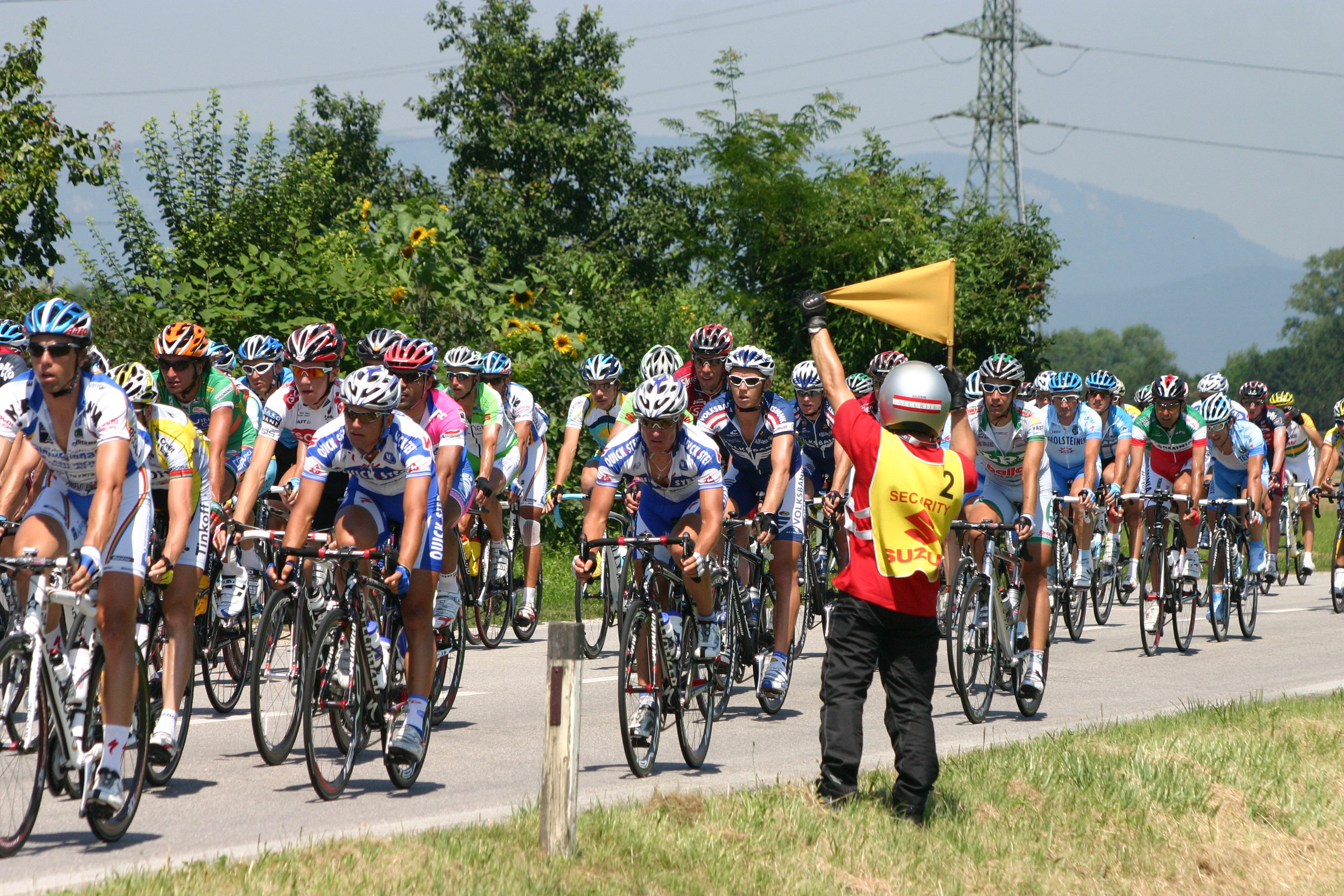 Österreich-Radrundfahrt 2008 Bild2 bei Schwarzau am Steinfeld